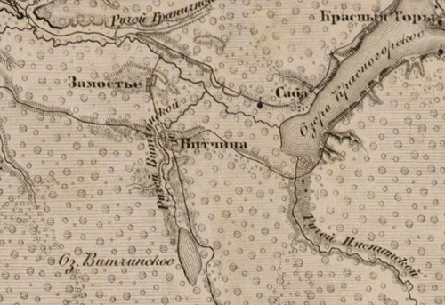 Деревня Ветчины на карте из «Исторического атласа Санкт-Петербургской Губернии»